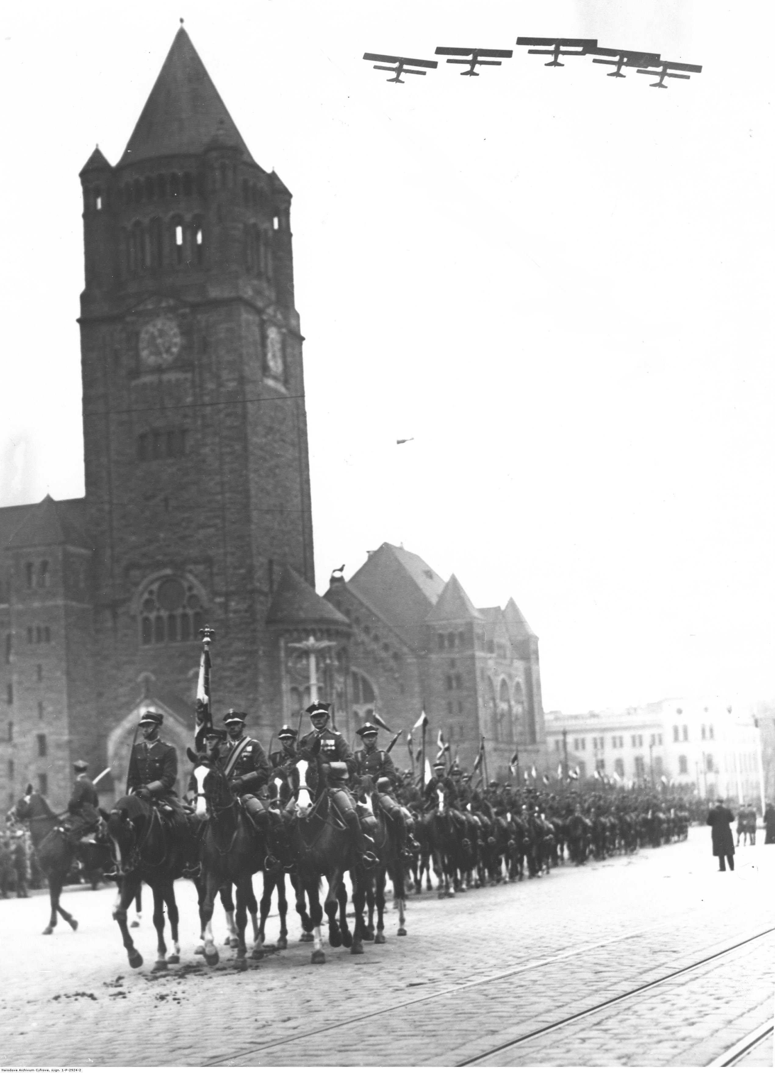 Święto Narodowe Trzeciego Maja – uroczystości w Poznaniu; 1936 r. Oddziały 15 Pułku Ułanów Poznańskich defilują ulicą Święty Marcin. U góry widoczne samoloty wywiadowcze 3 Pułku Lotniczego. Z lewej wieża Zamku Cesarskiego. Koncern Ilustrowany Kurier Codzienny - Archiwum Ilustracji. Sygnatura: 1-P-2924-2